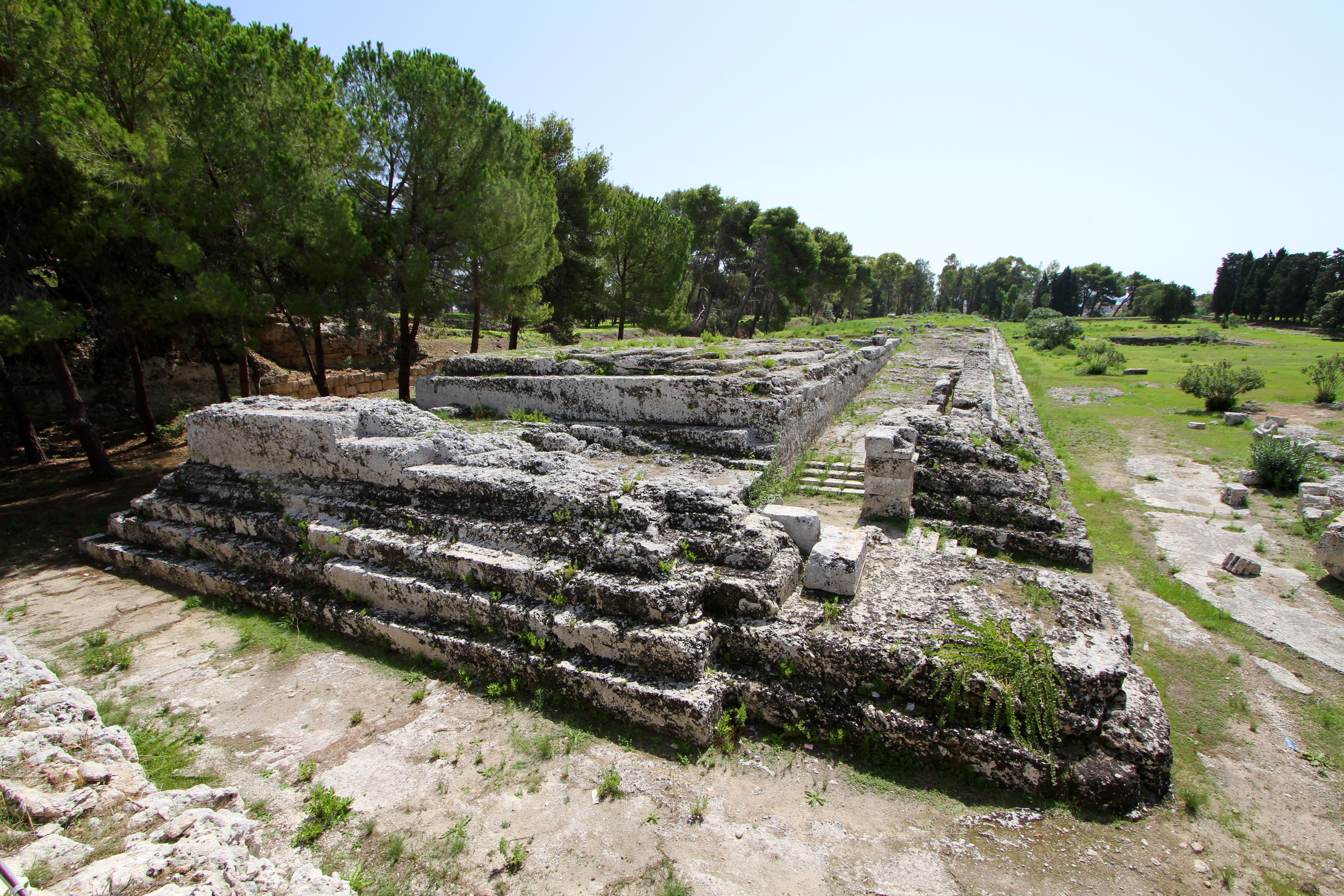 Siracusa: Ara di Ierone II